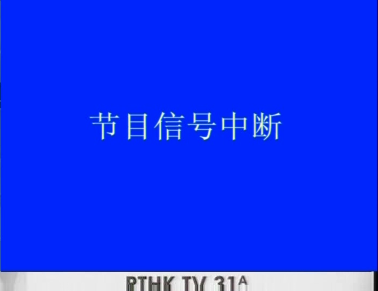 广东有线本港台停播后RTHK31A信号出现瞬间 广东有线DVB-C录制画面